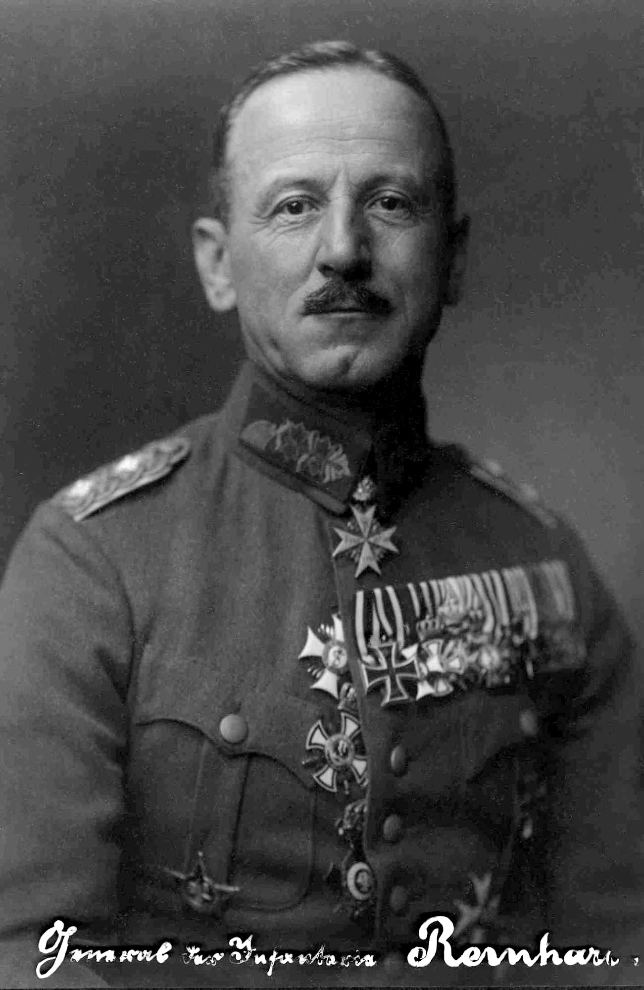 Walther Reinhardt (* 24. März 1872 in Stuttgart; † 8. August 1930 in Berlin) war ein deutscher Offizier, zuletzt General der Infanterie sowie letzter Preußischer Kriegsminister